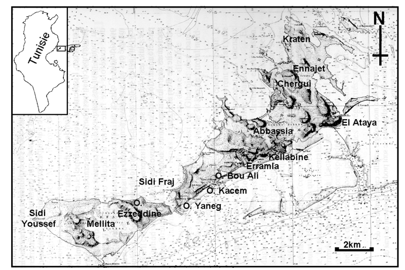 Carte créée par M. Ameur Oueslati, géographe tunisien, représentant la topographie terrestre et maritime des îles Kerkennah ainsi que la localisation des villages kerkenniens.